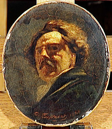 Portrait d'homme, dit : Portrait de Jules Barbey d'Aurevilly, par Octave Tassaert, musée des beaux-arts de Caen.